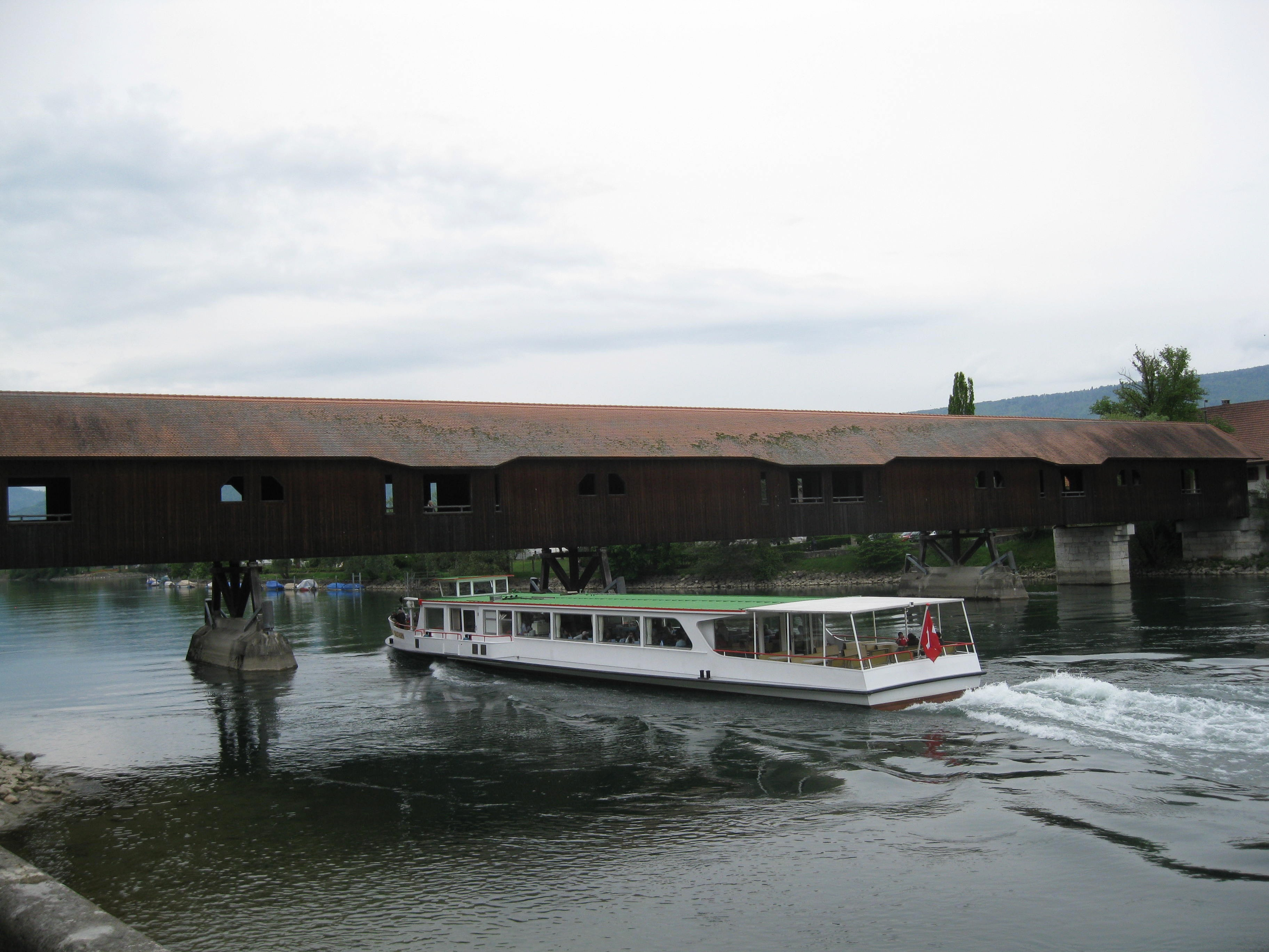 Schiff Stadt Solothurn unter der alten Holbrücke in Büren